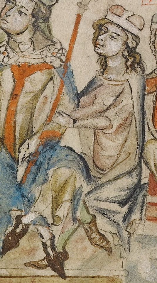 Ota I. Meránský